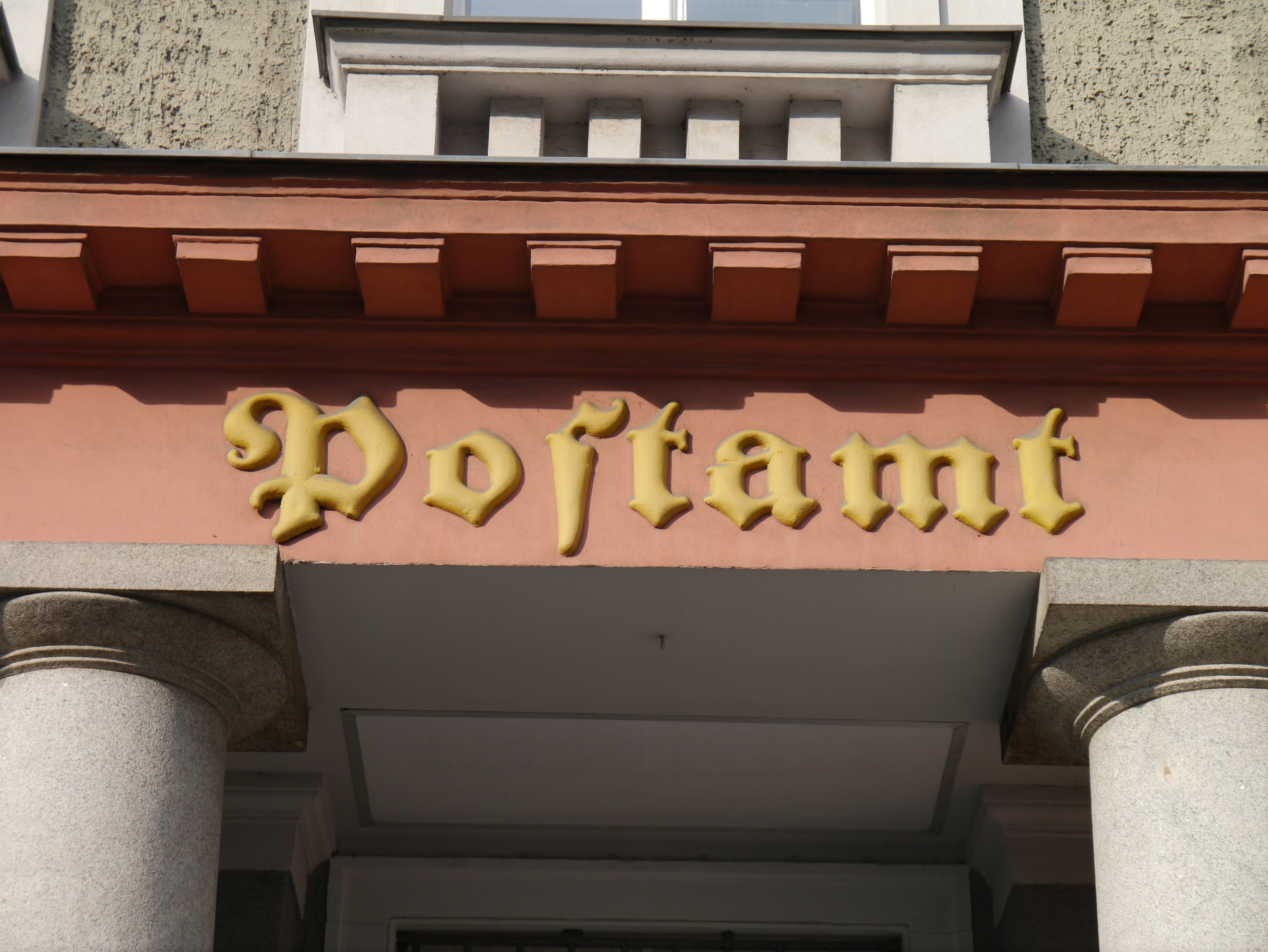 Postamt Pankow I 2015.